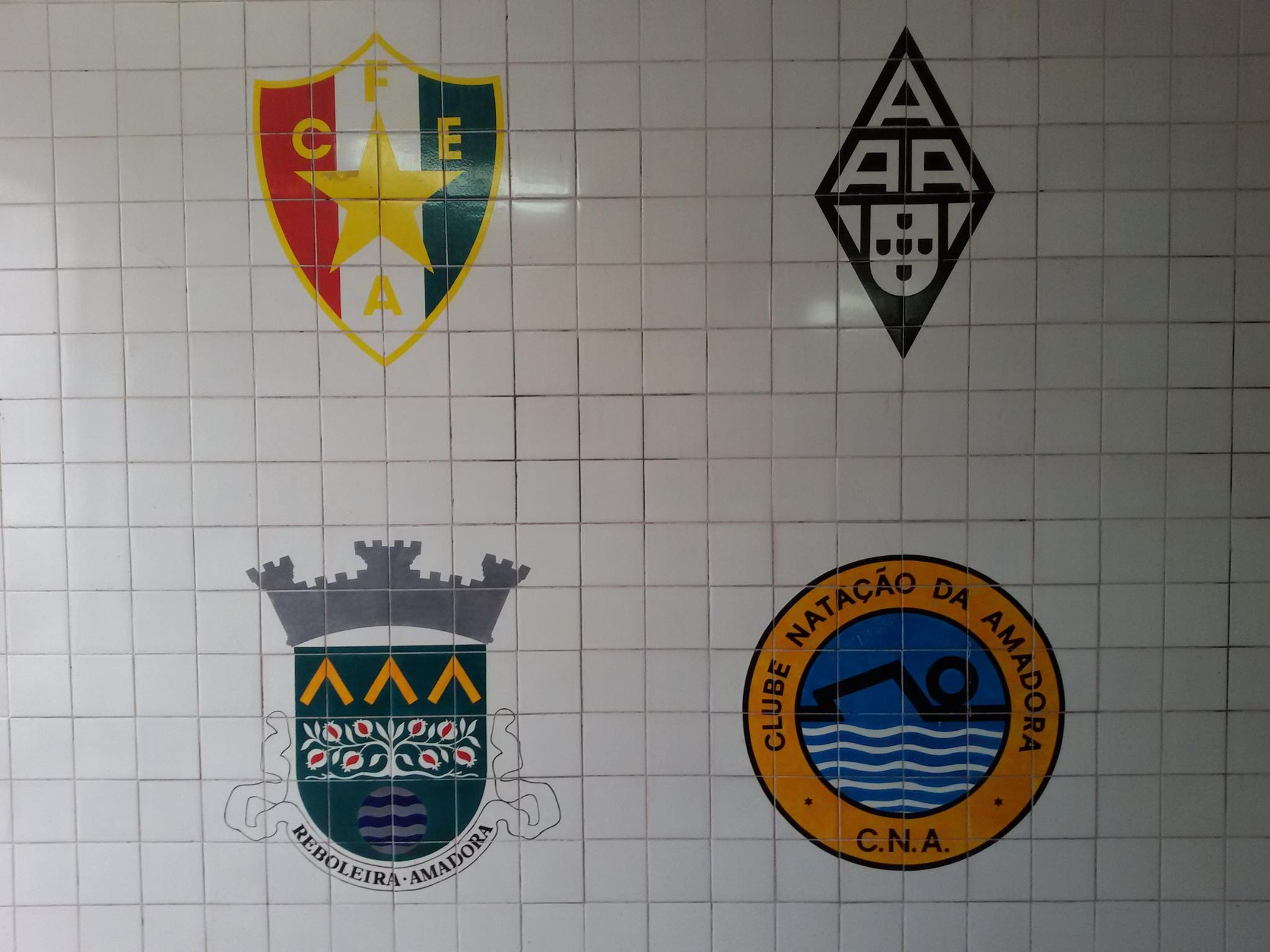 Painel de azulejos com os emblemas dos clubes da Amadora, na estação de comboios da Reboleira.